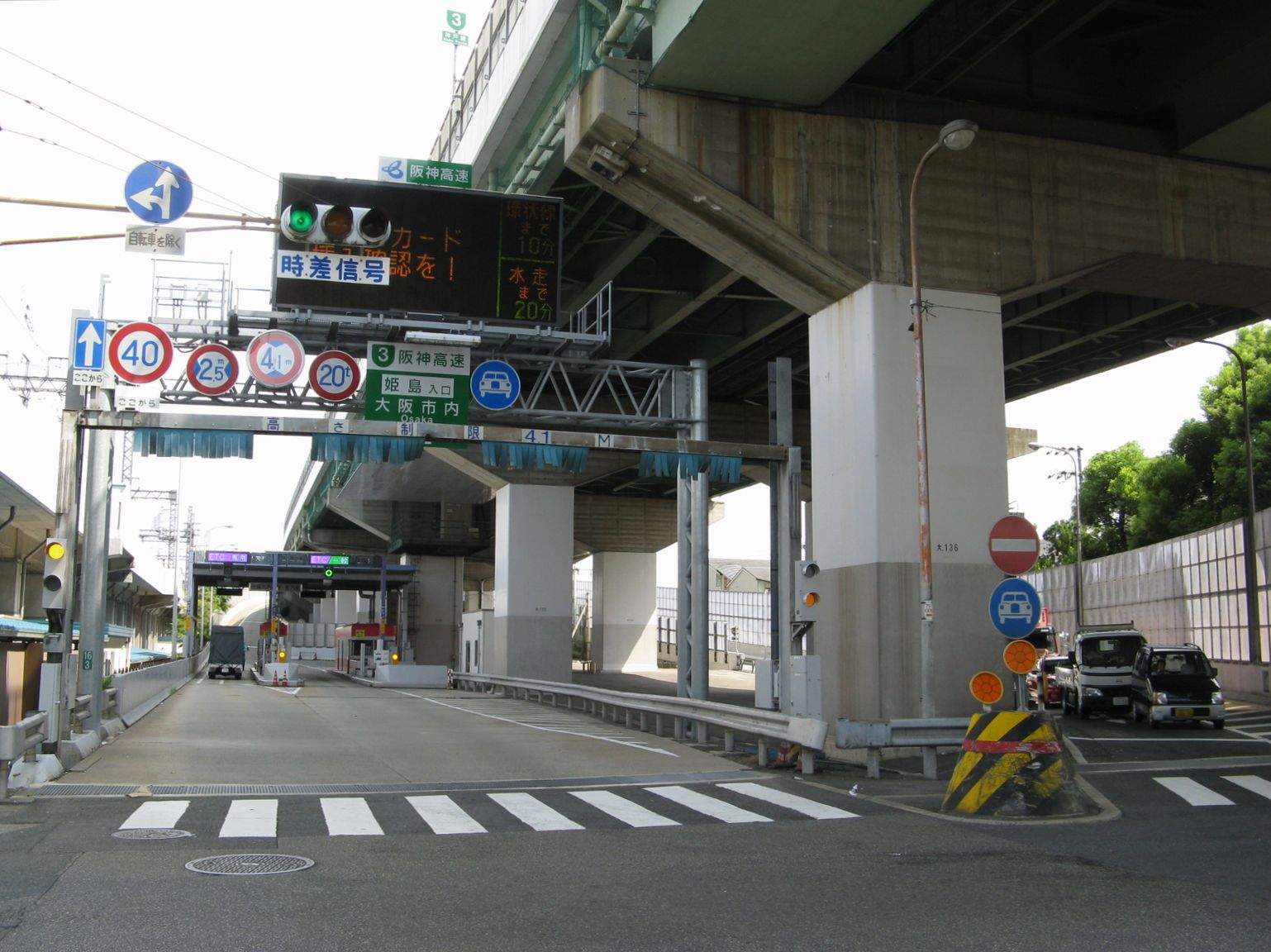 阪神高速姫島出入口 東望